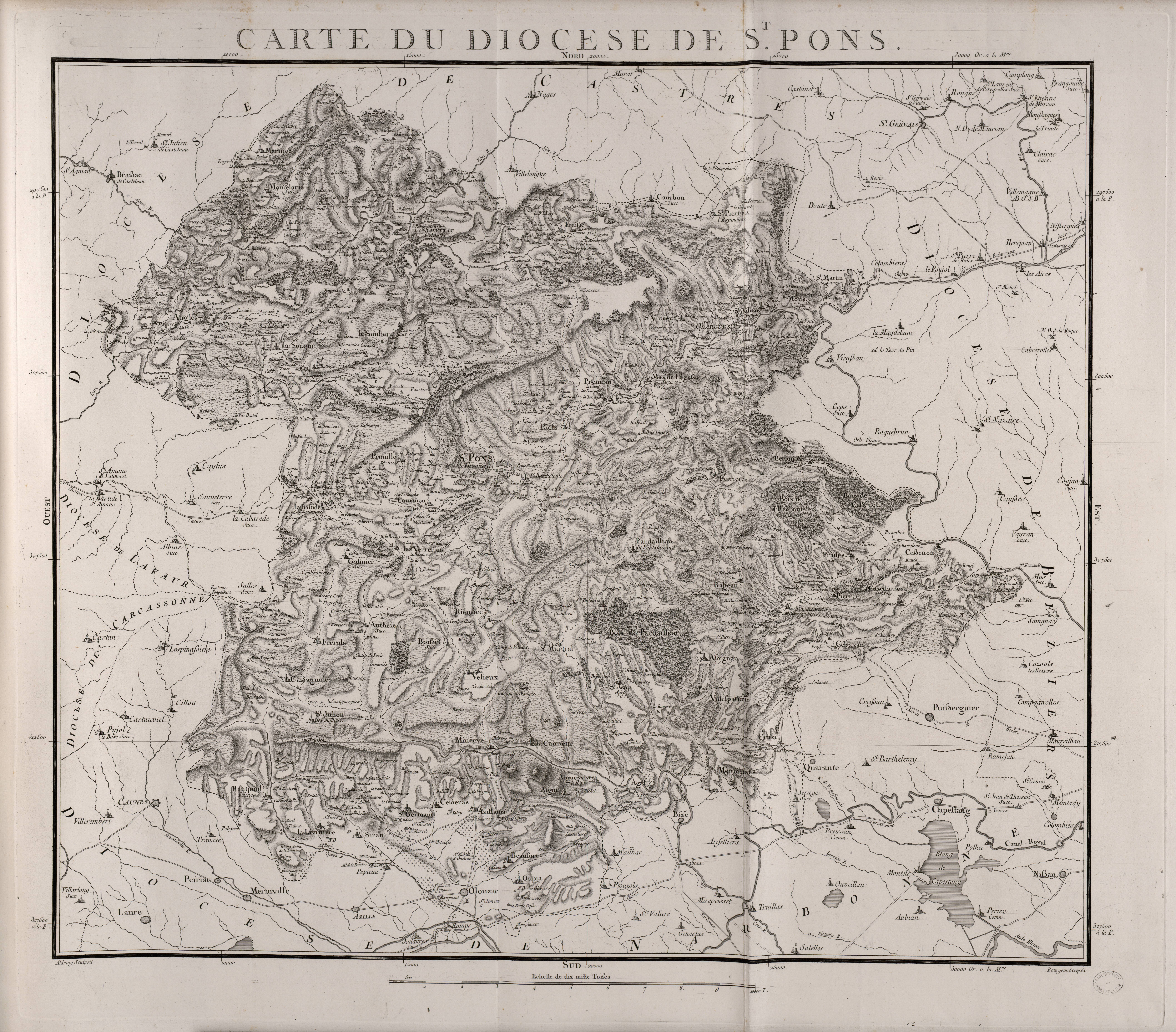 Carte du diocèse de St. Pons [Saint-Pons-de-Thomières], extraite de Diocèses de la province du Languedoc (1781)